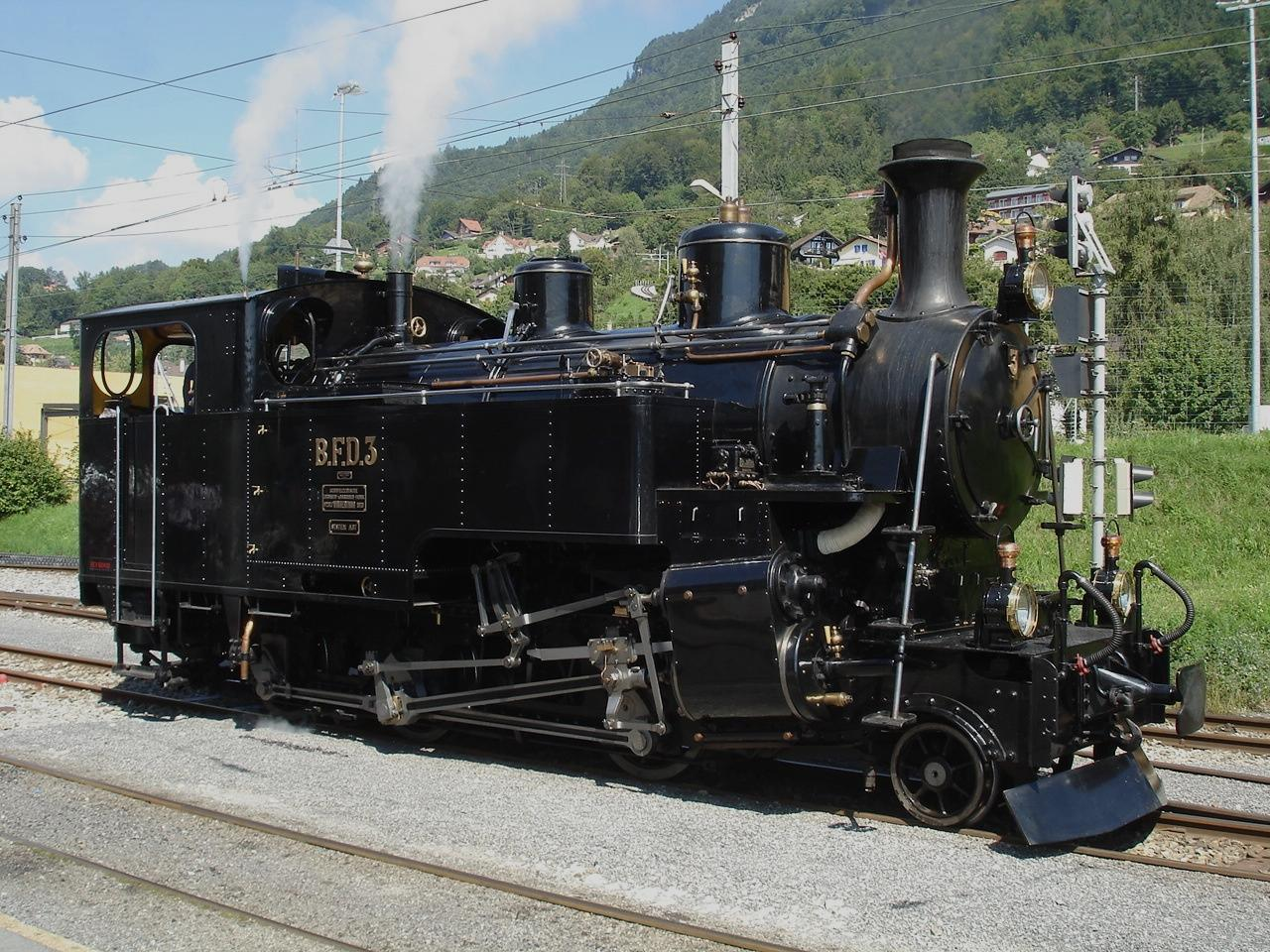 Dampflokomotive HG 3/4 3 mit gemischtem Adhäsions- und Zahnradantrieb der ehemaligen der Brig–Furka–Disentis-Bahn (DFB) bei der Museumsbahn Blonay-Chamby (BC) im Sommer 2010 in Blonay.